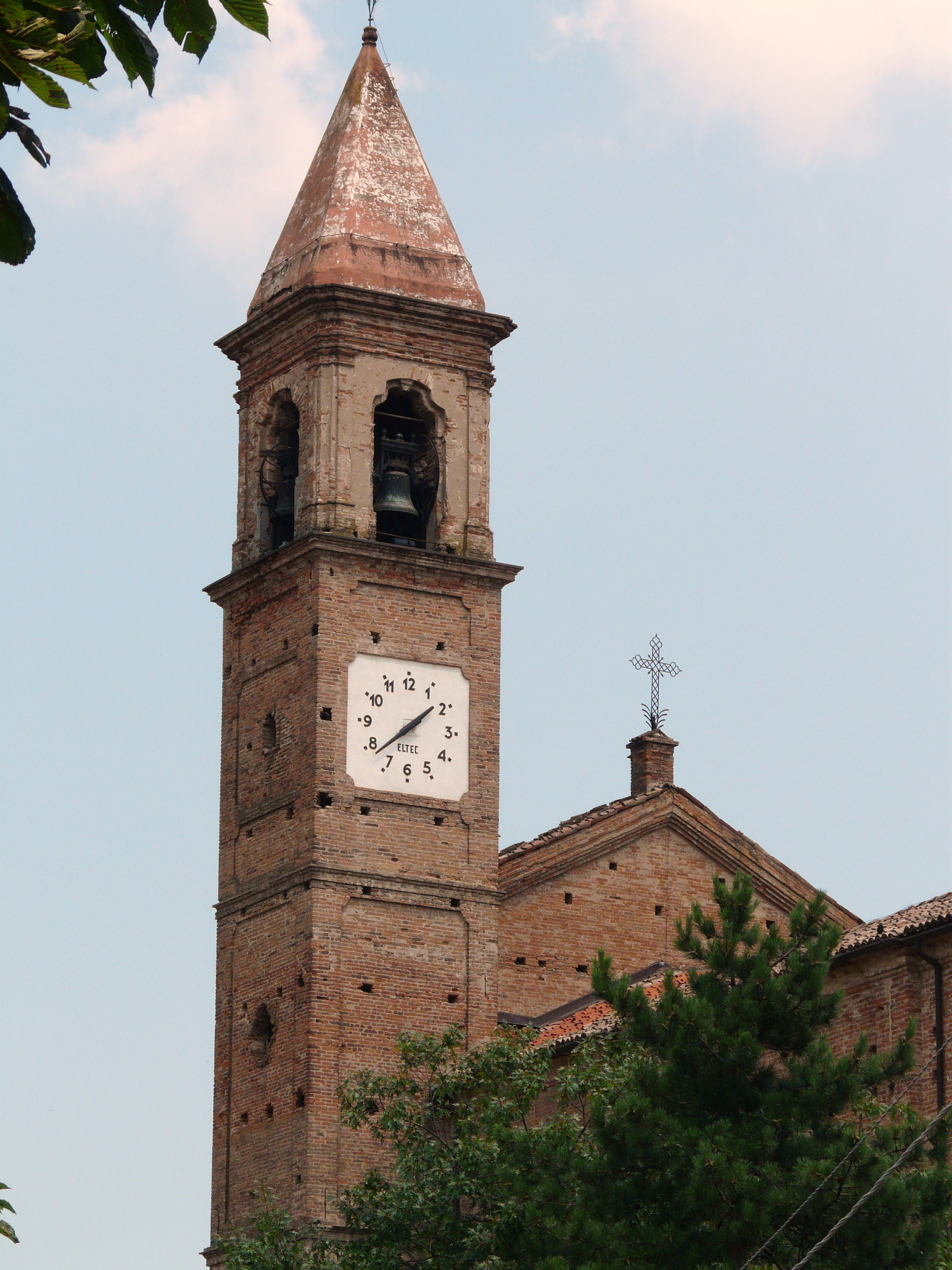 Chiesa di Santa Maria e di San Remigio, Pecetto di Valenza, Piemonte, Italia